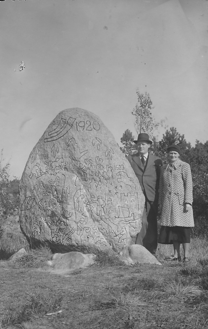 Alfred Kaae og hustru Thyra Magrethe Svendsen ved Historiens Sten 1938.